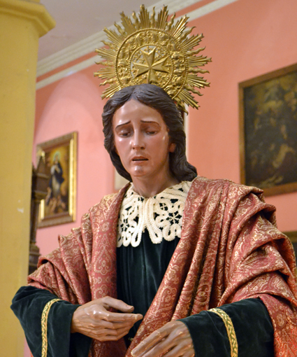 San Juan Evangelista, Cotitular de la Hermandad de la Soledad de San Fernando